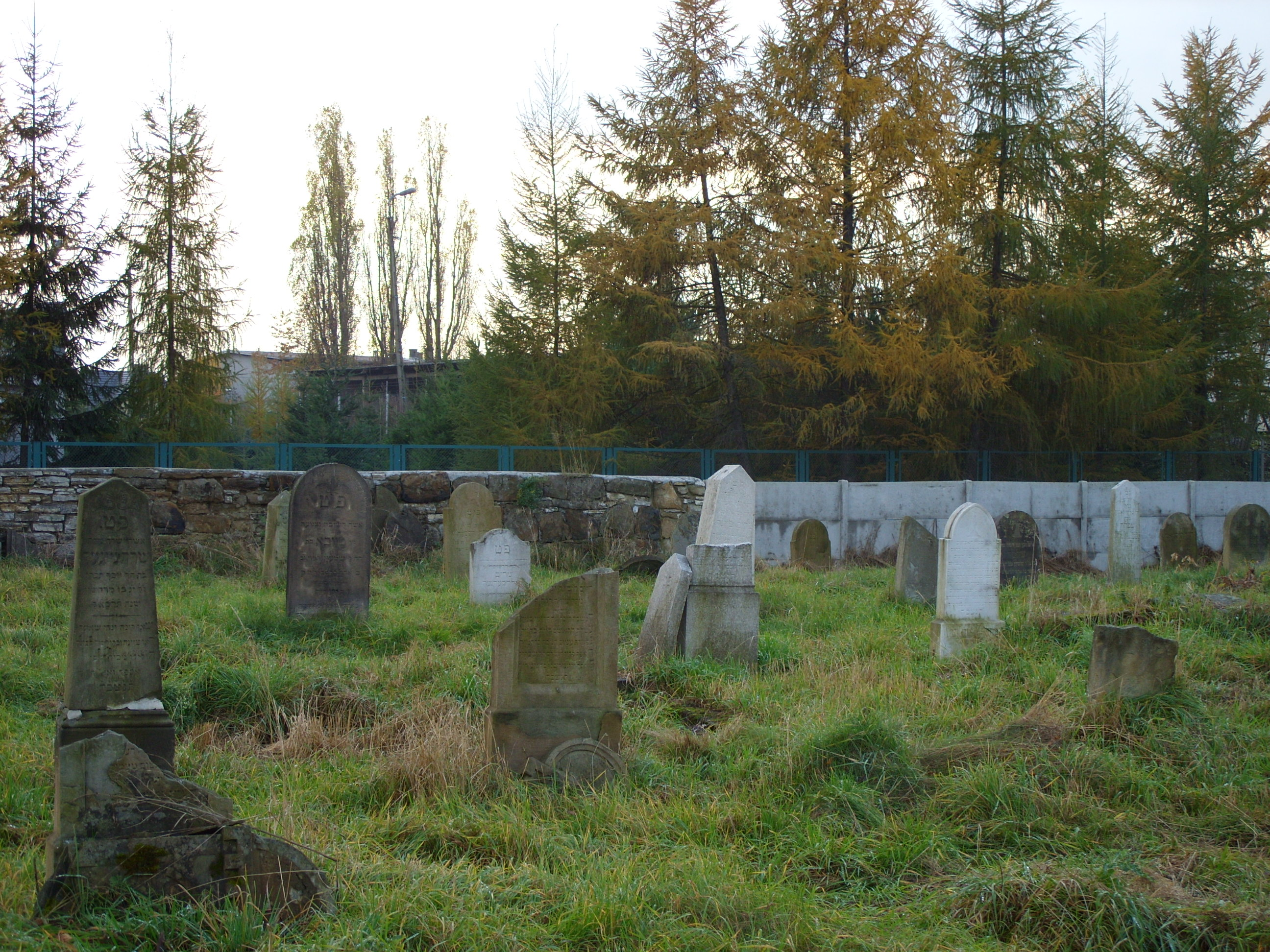 cmentarz żydowski w Żywcu